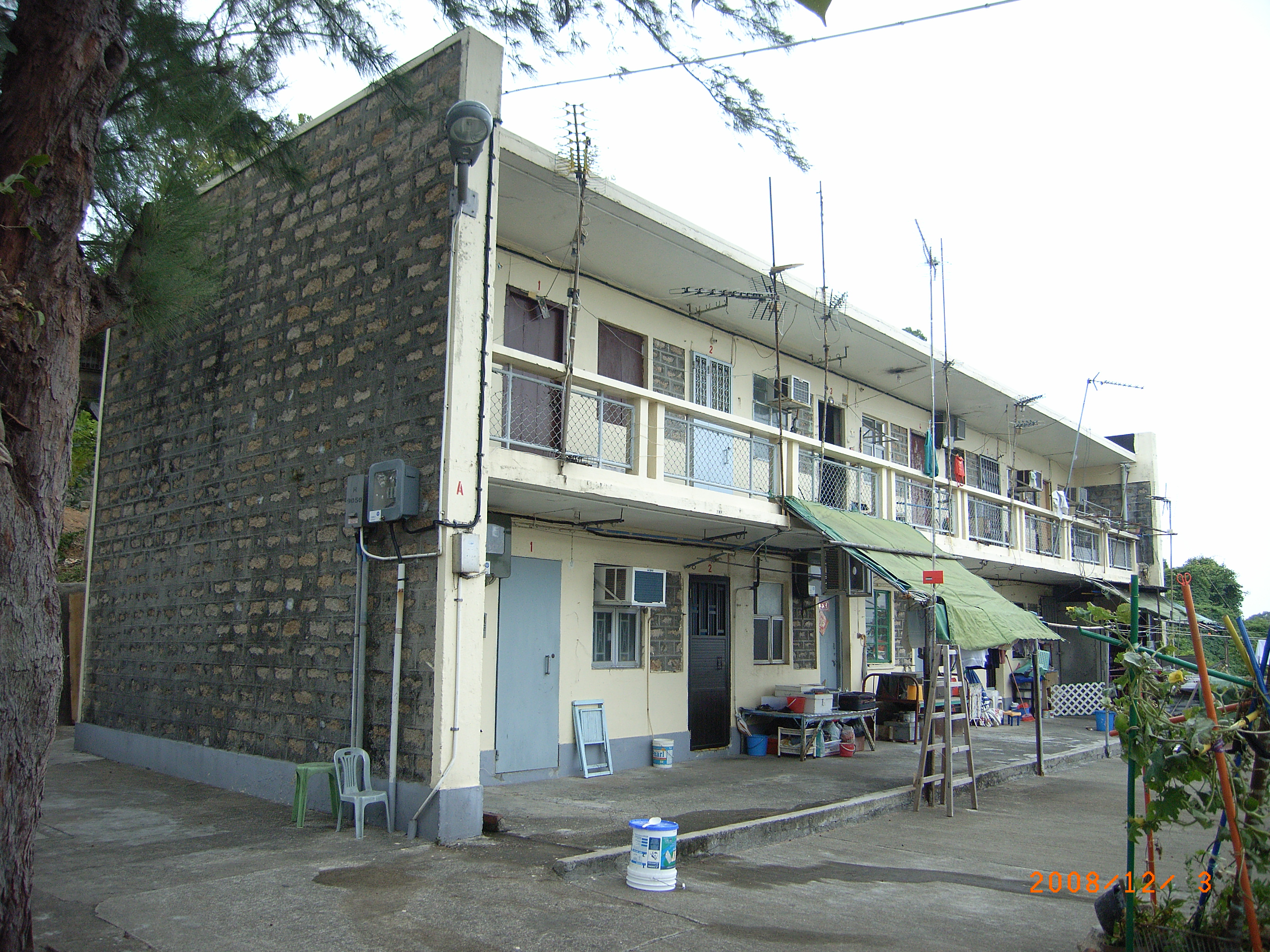 中文（香港）: 圓桌二村_雙層平房